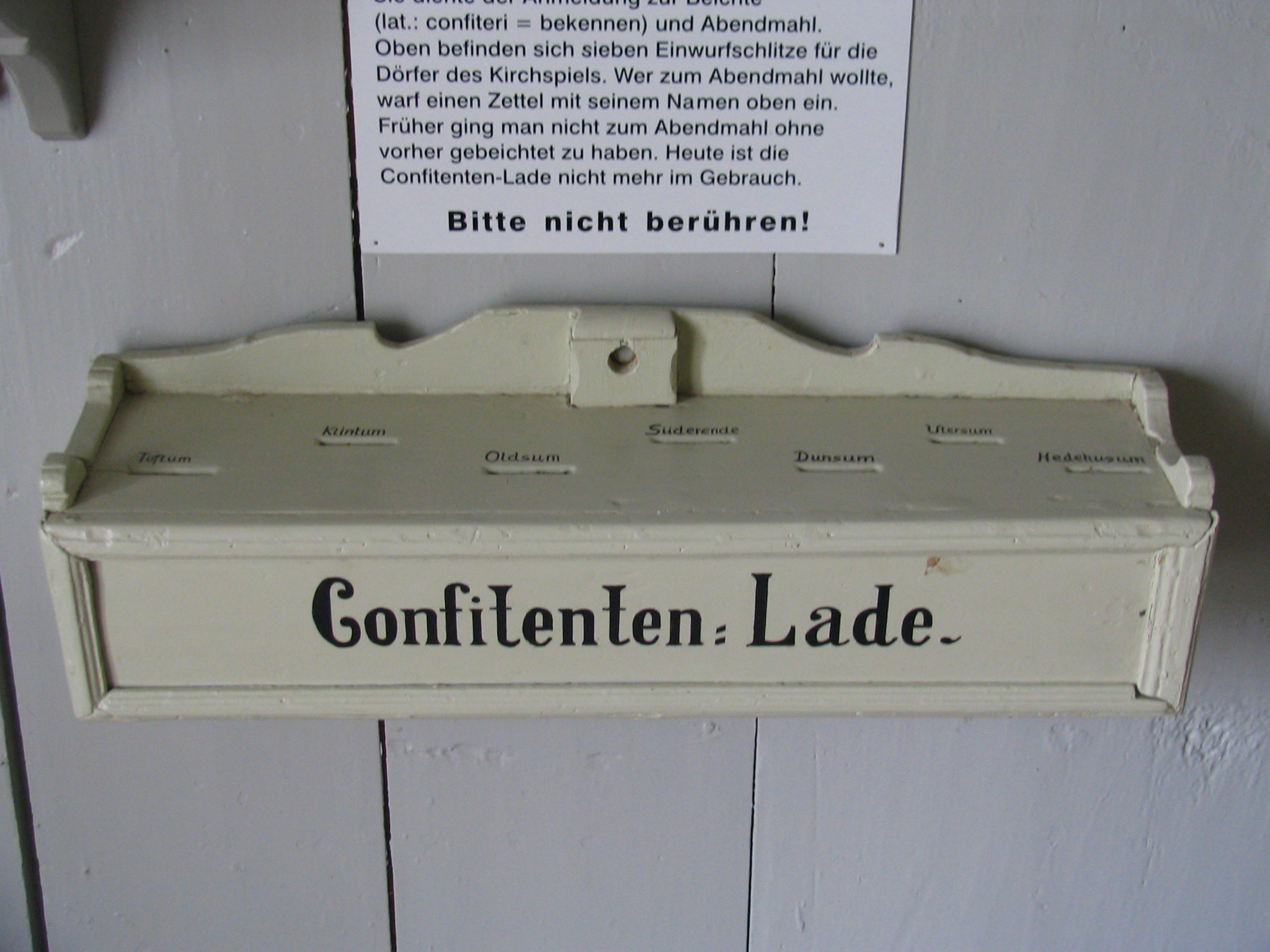 Deckengewölbe und Kirchenorgel in St. Laurentii auf Föhr